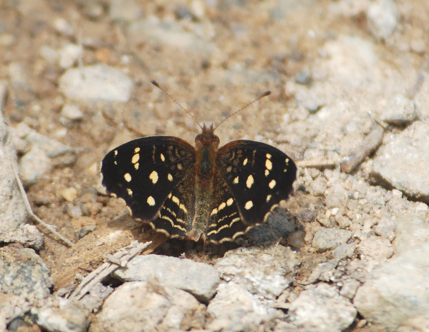 Ardys Crescent at La Soledad, Oaxaca, Mexico, 080328. Anthanassa ardys.